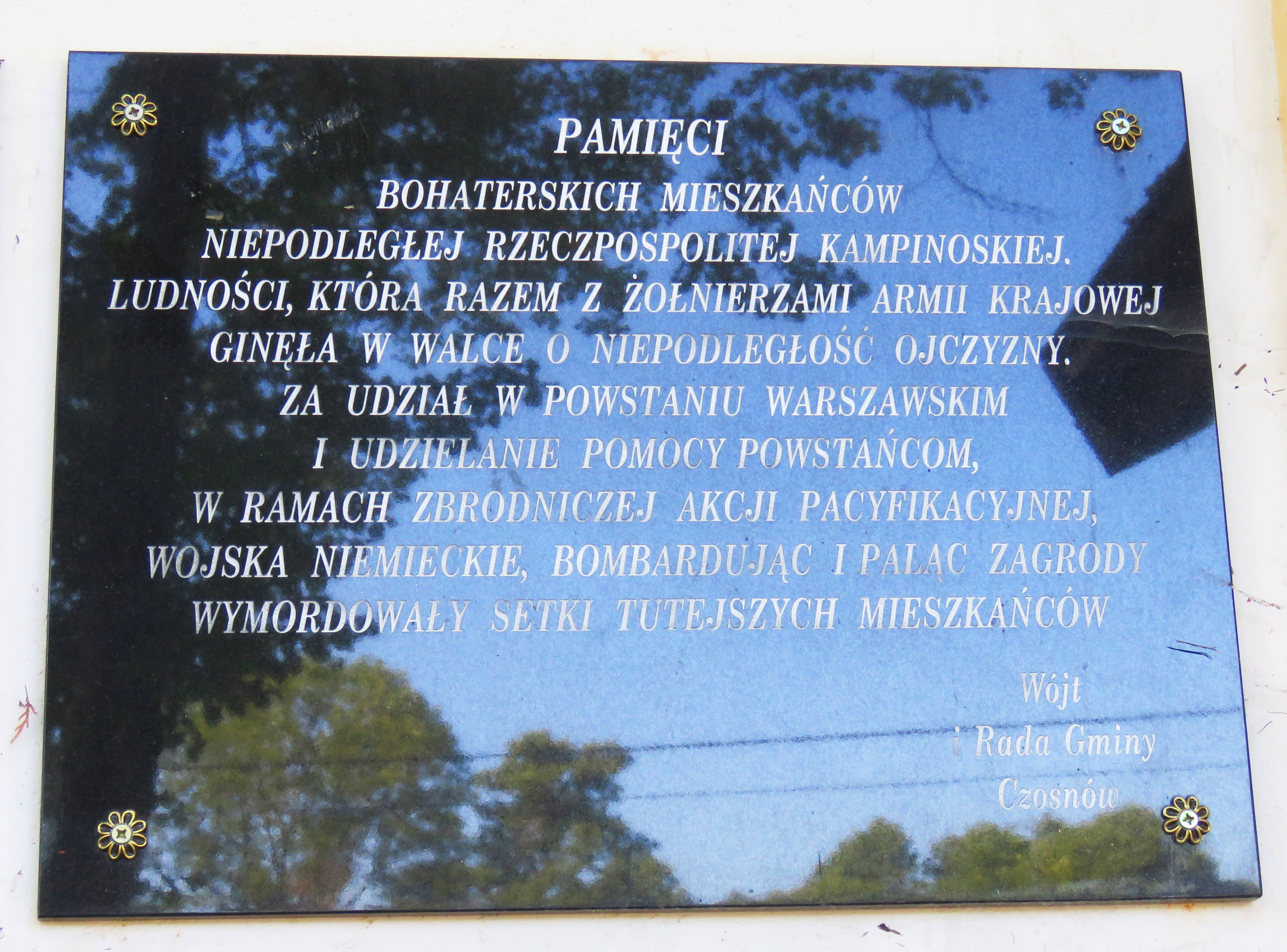 Kościół p.w. Św. Maksymiliana Marii Kolbe TABLICA NA KOŚCIELE 03